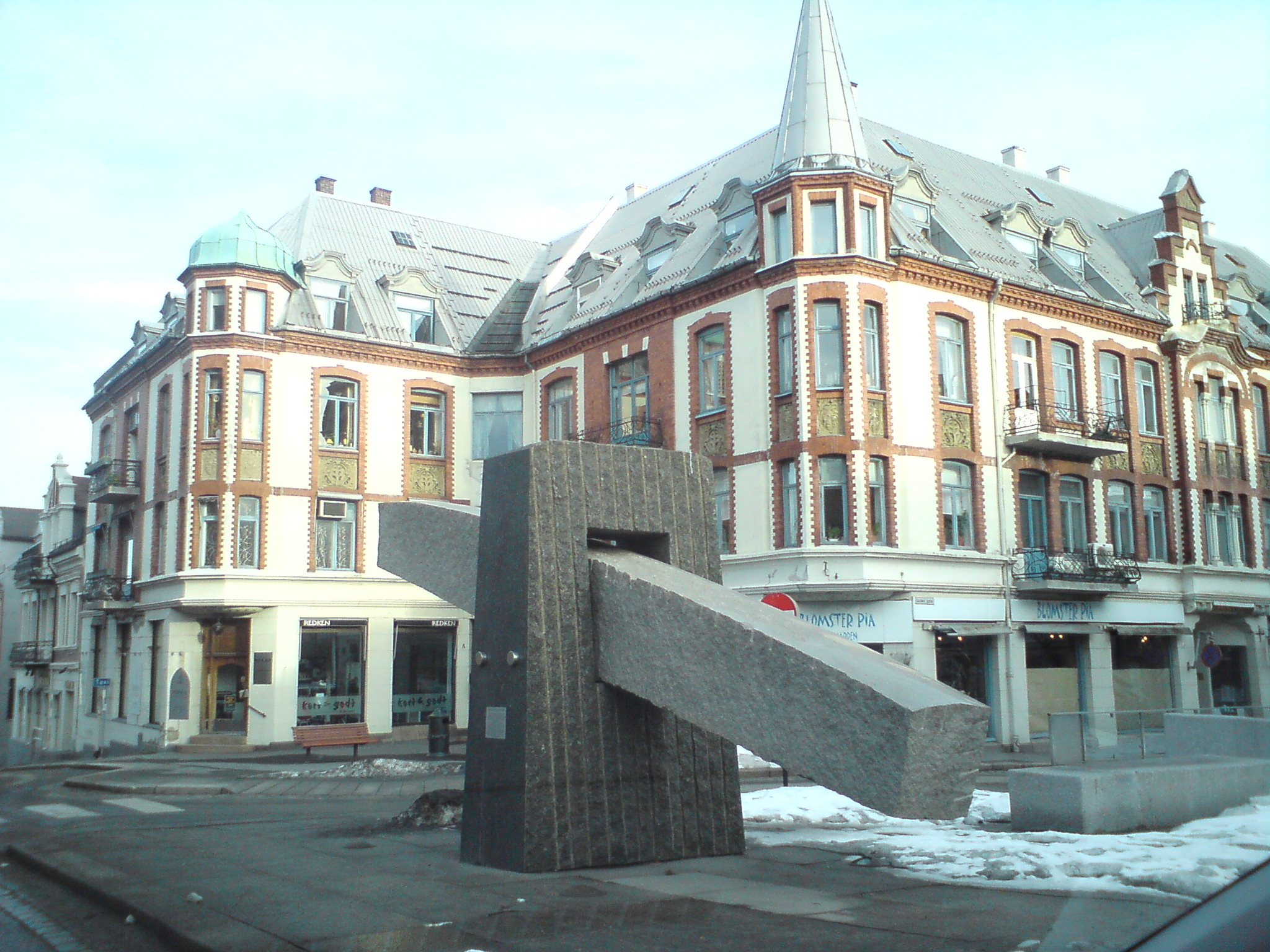 Torvgaarden/Torvgården, Gudes gate 2 i Moss, fra 1903, jugend. Arkitekt Oskar Dehkes.